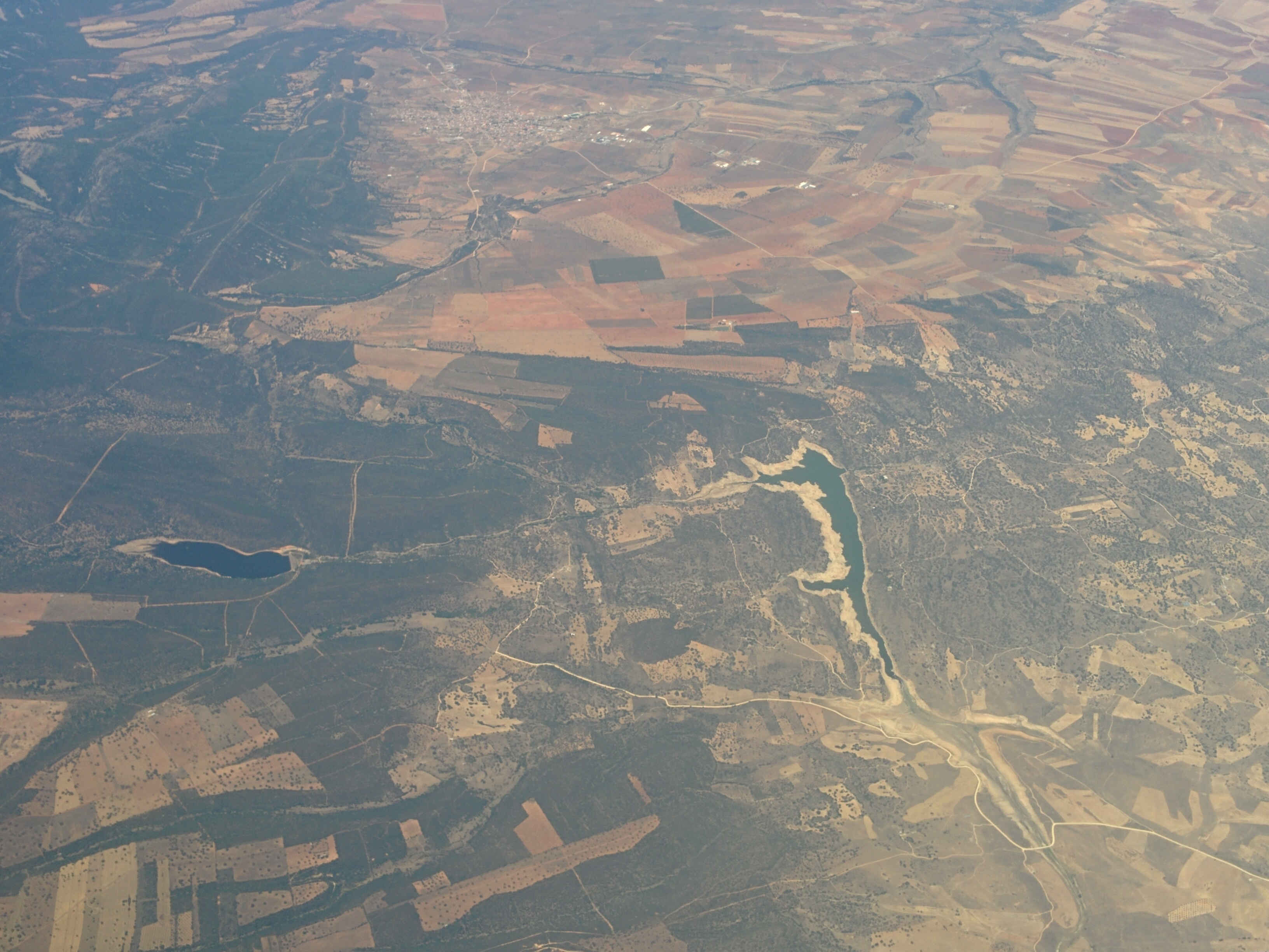 Vista aérea del pantano del Torcón, en Toledo (España).